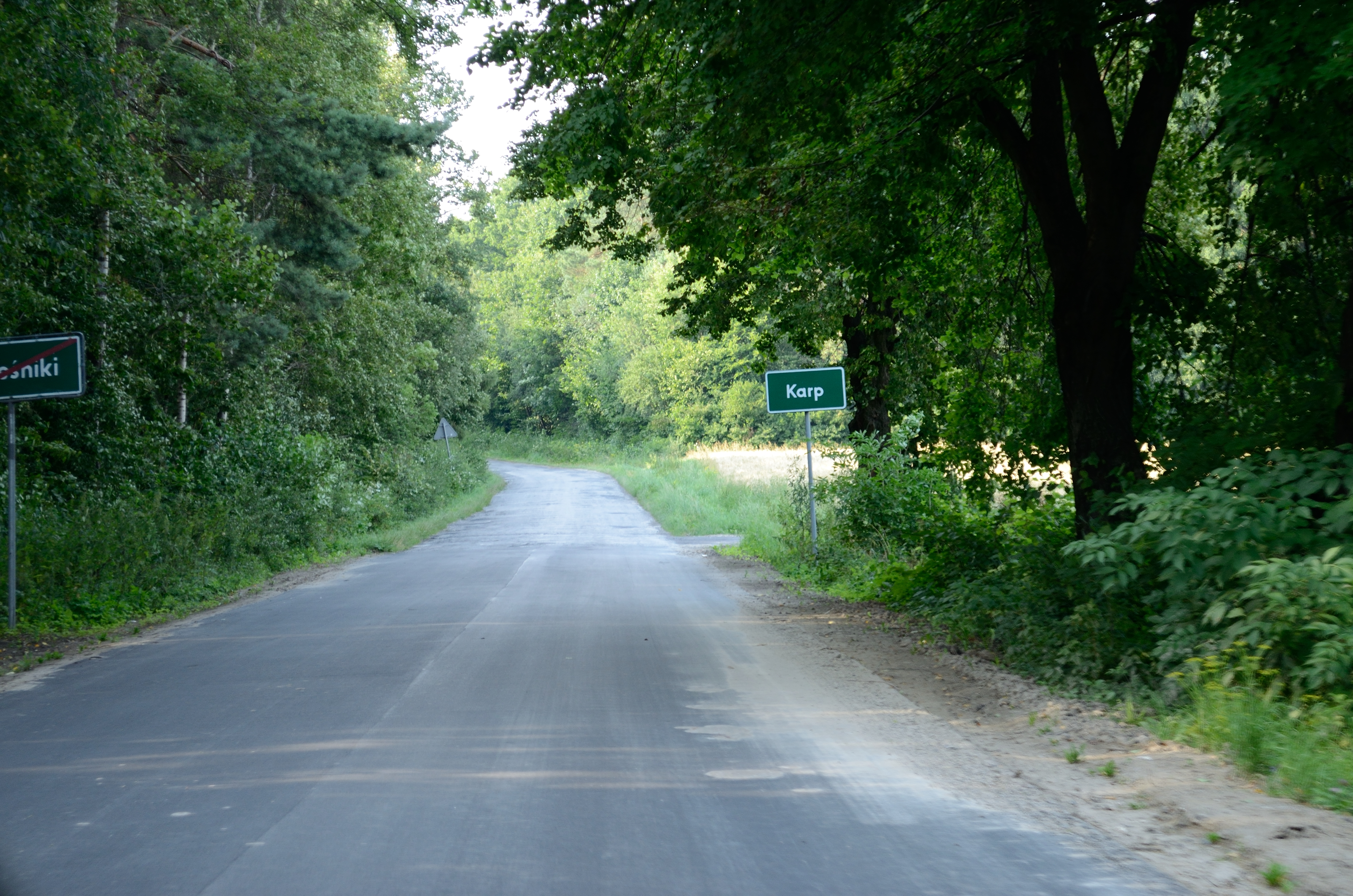 Karp - znak